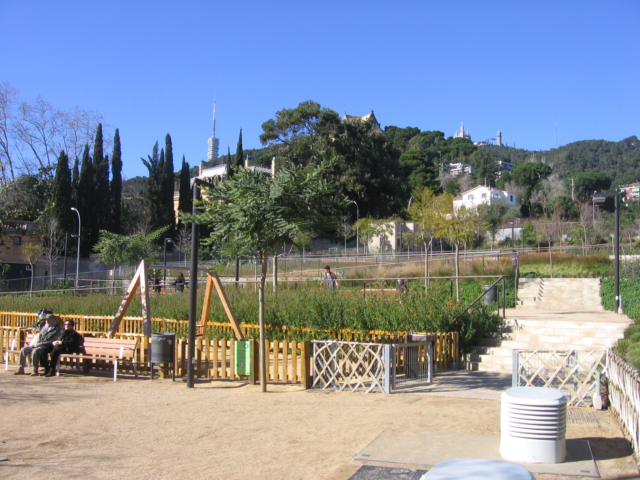 Parque Torrent Maduixer, Barcelona.